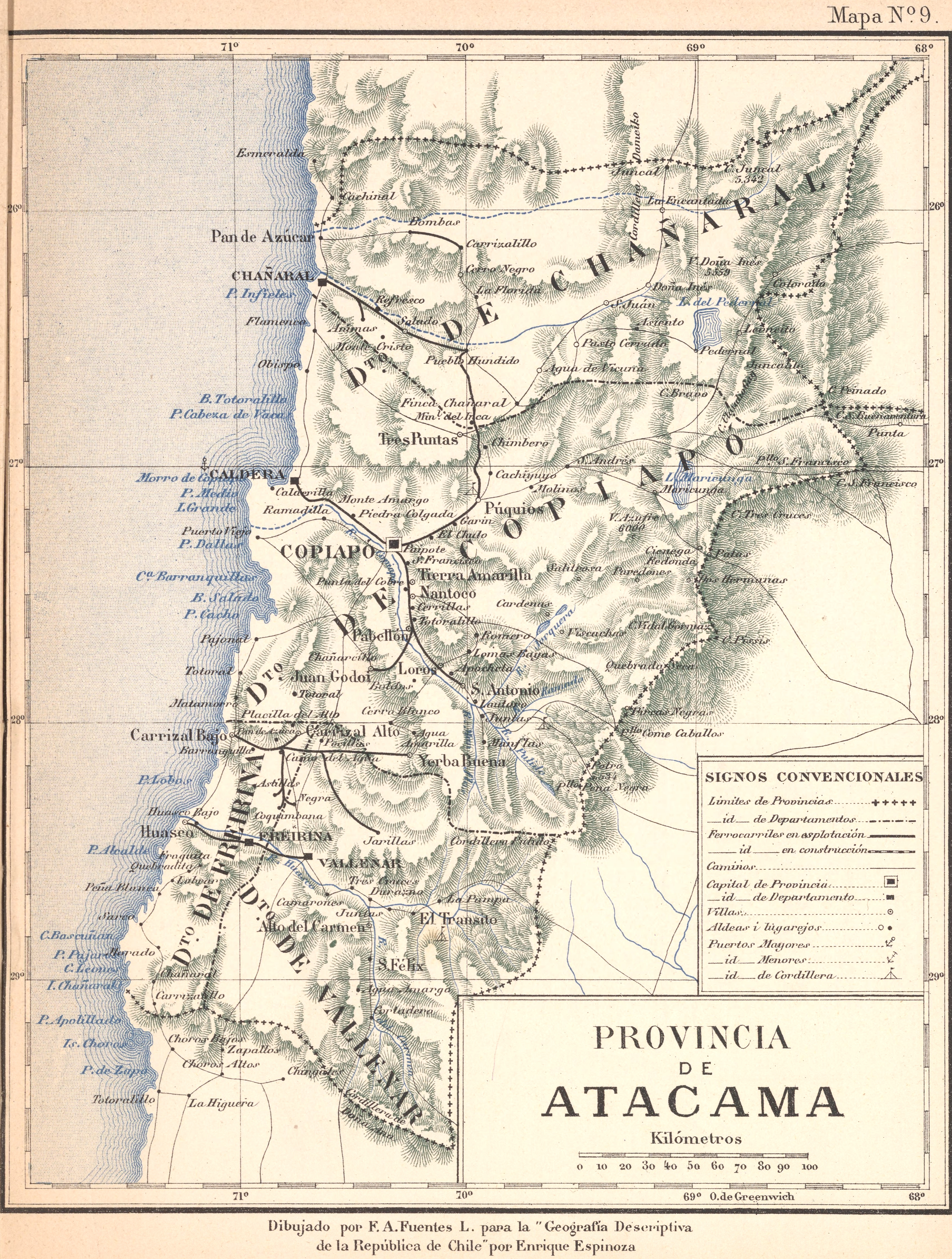 Mapa de la antigua Provincia de Atacama, equivalente a la actual III Región de Atacama, Chile, hacia 1895.